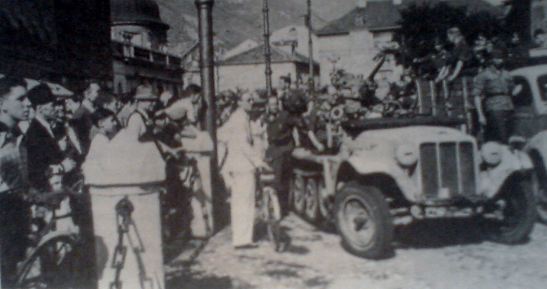 Truppe germaniche accolte dai sudtirolesi a Bolzano (9 settembre 1943)